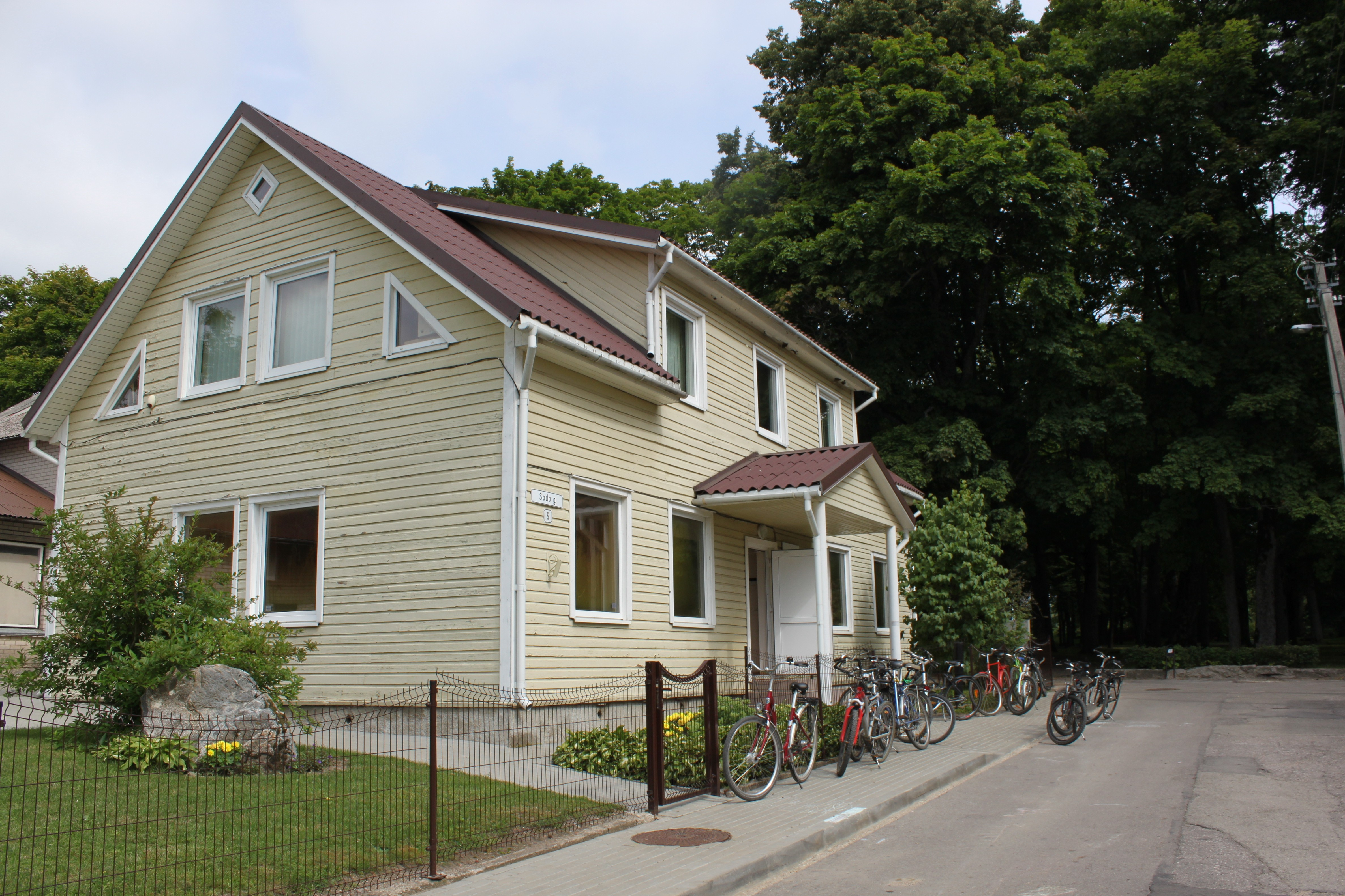 Gargždų krašto muziejaus pastatas. Vadovas:Sigita Bučnytė